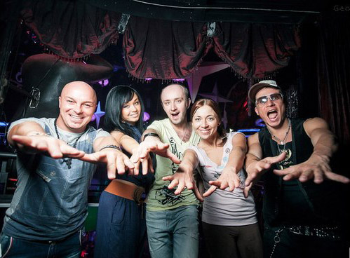 2012 год, бэк-стэйдж, Нижний Новгород, группа Краски.